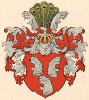 Lode suguvõsa aadlivapp